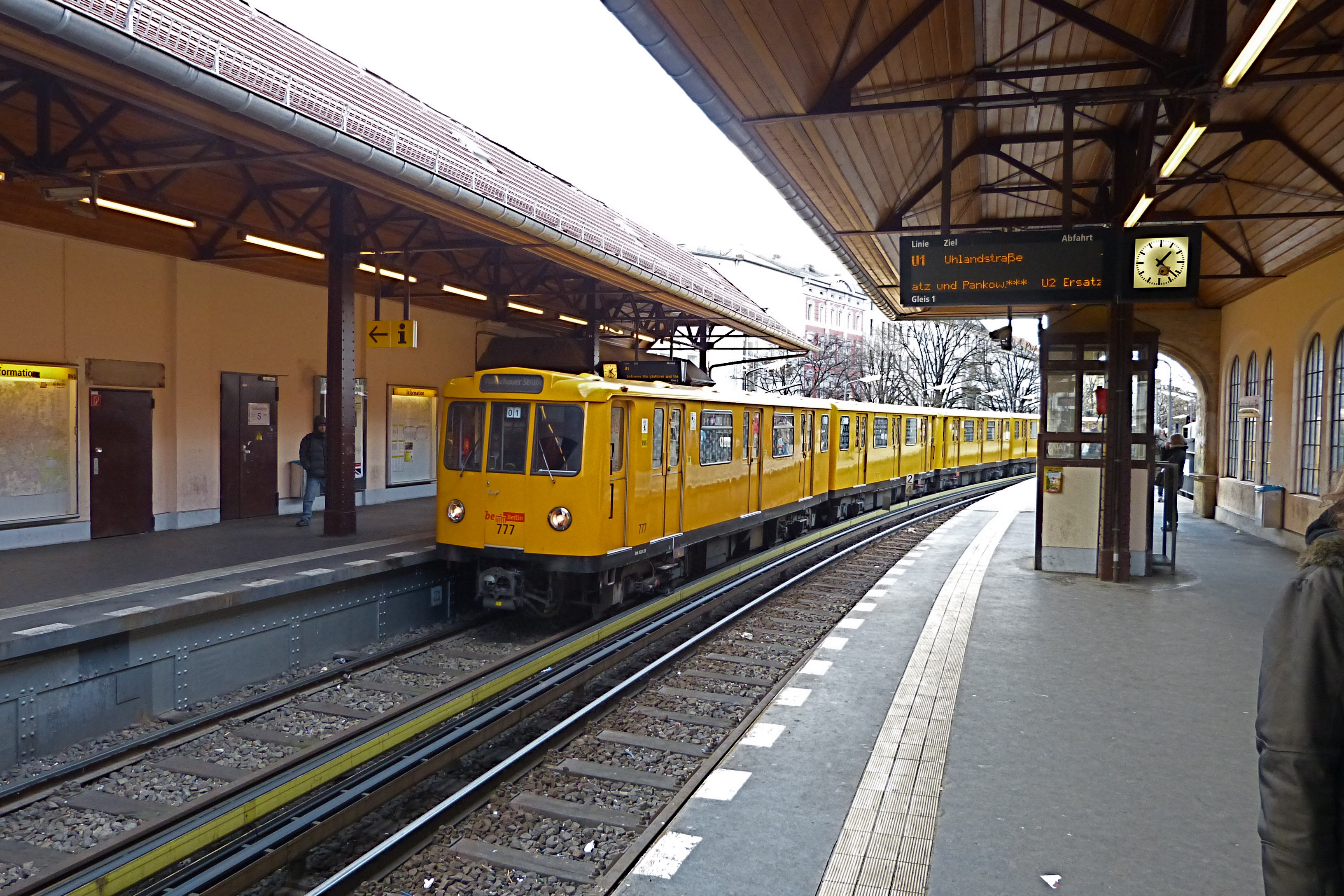 Berlin-Kreuzberg, U-Bahnhof Schlesisches Tor; Bahnsteig mit Einfahrt eines A3L71